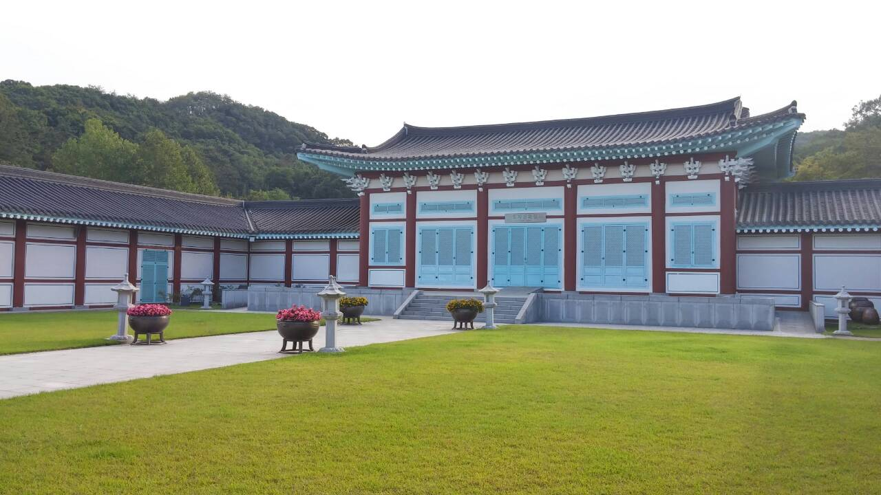 이천시립박물관